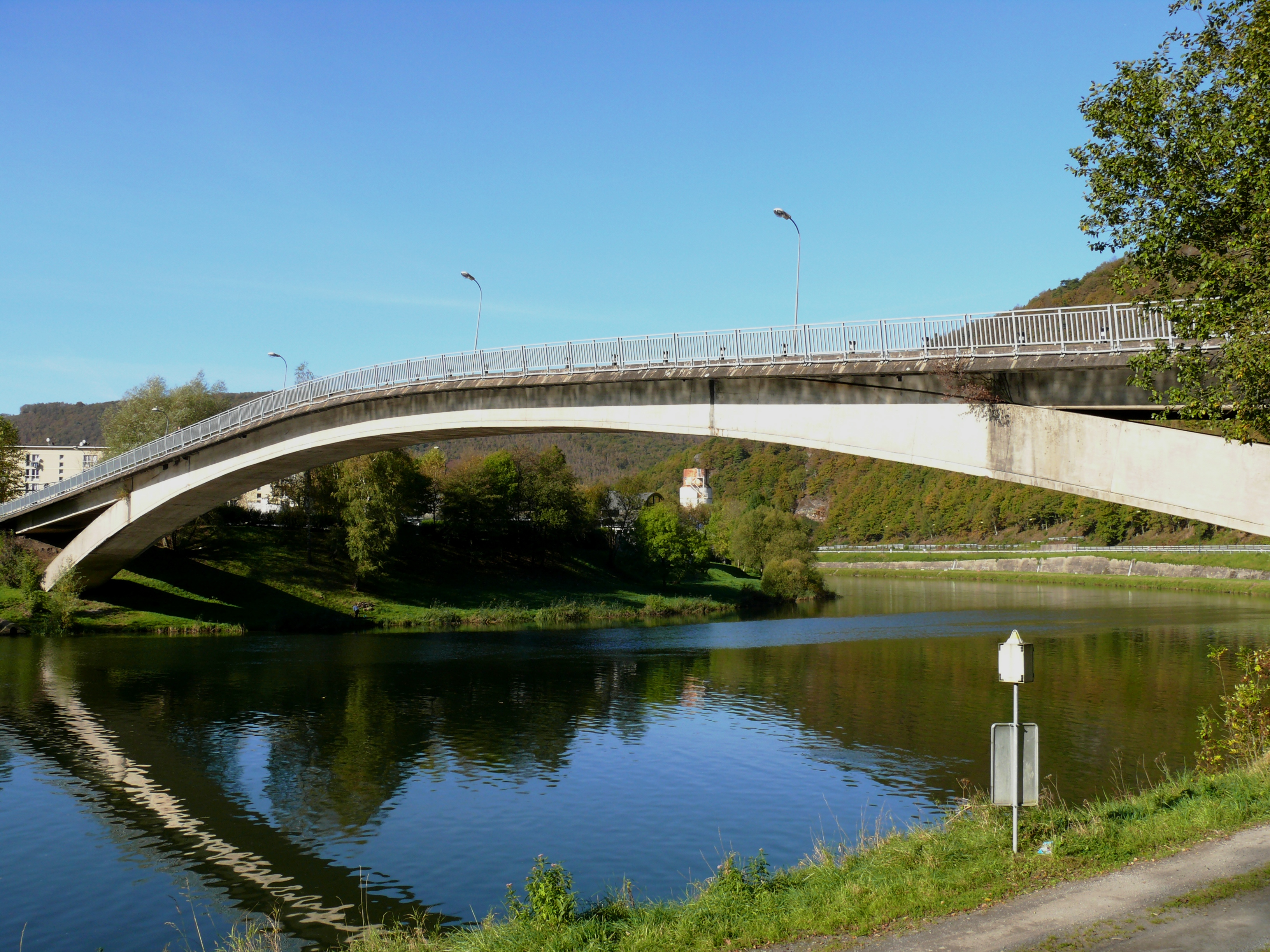 Revin - Pont amont passerelle d'Orzy